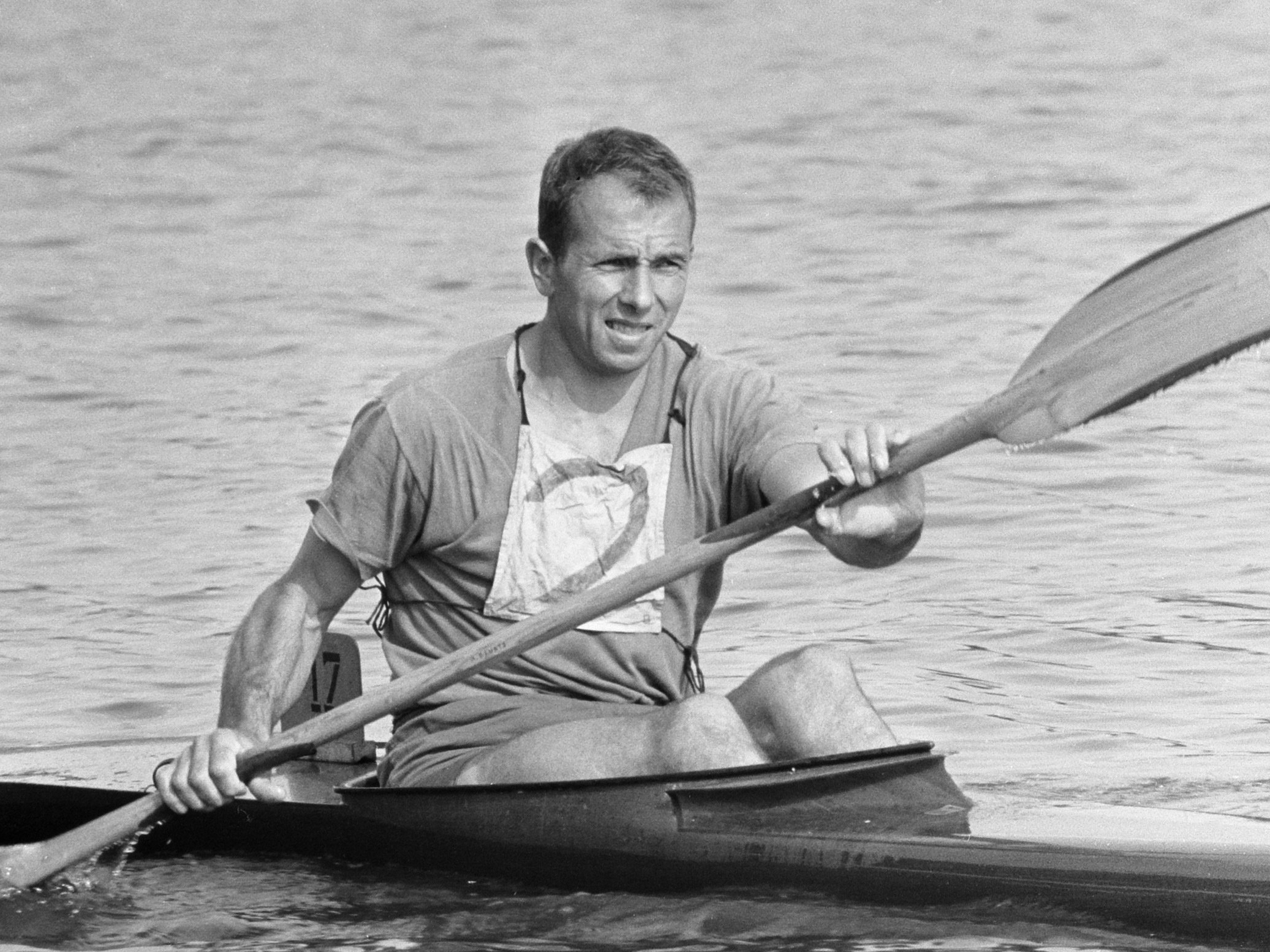 Kanovaren, kampioenschappen K1 Nederland 1968, Toon Geurts in actie 1 augustus 1968